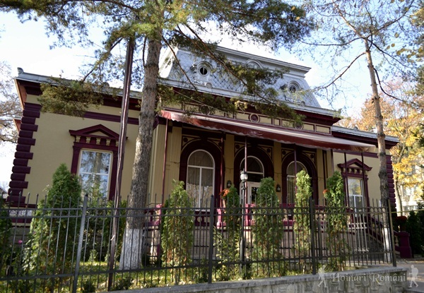 Casă Dorohoi